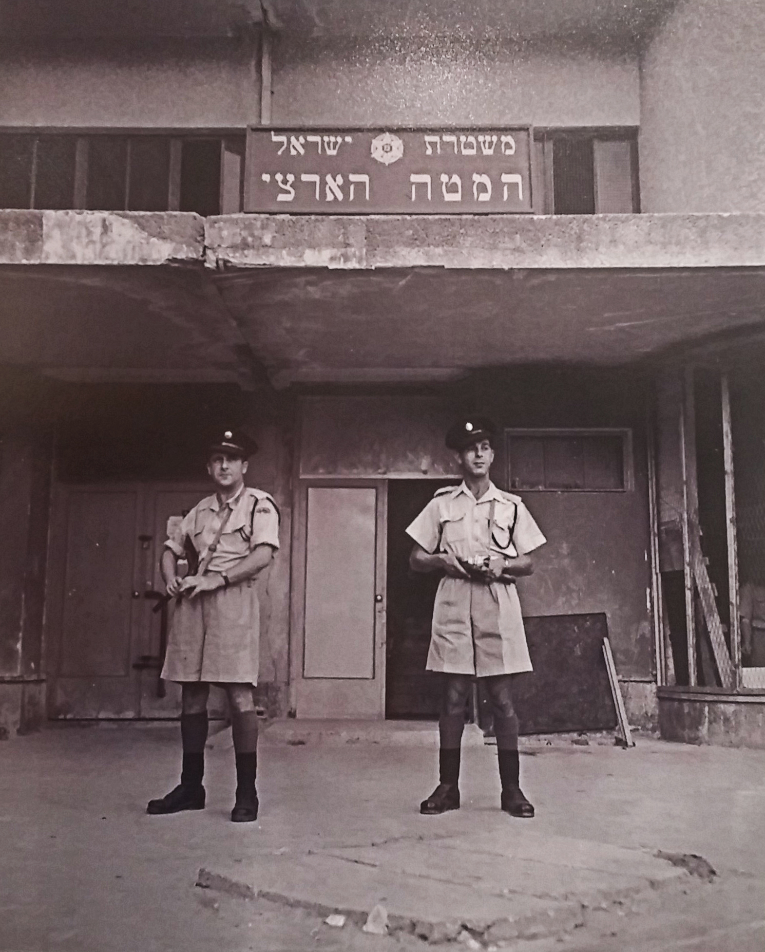 שוטרים בפתח המטה הארצי של המשטרה בשרונה, אוקטובר 1948